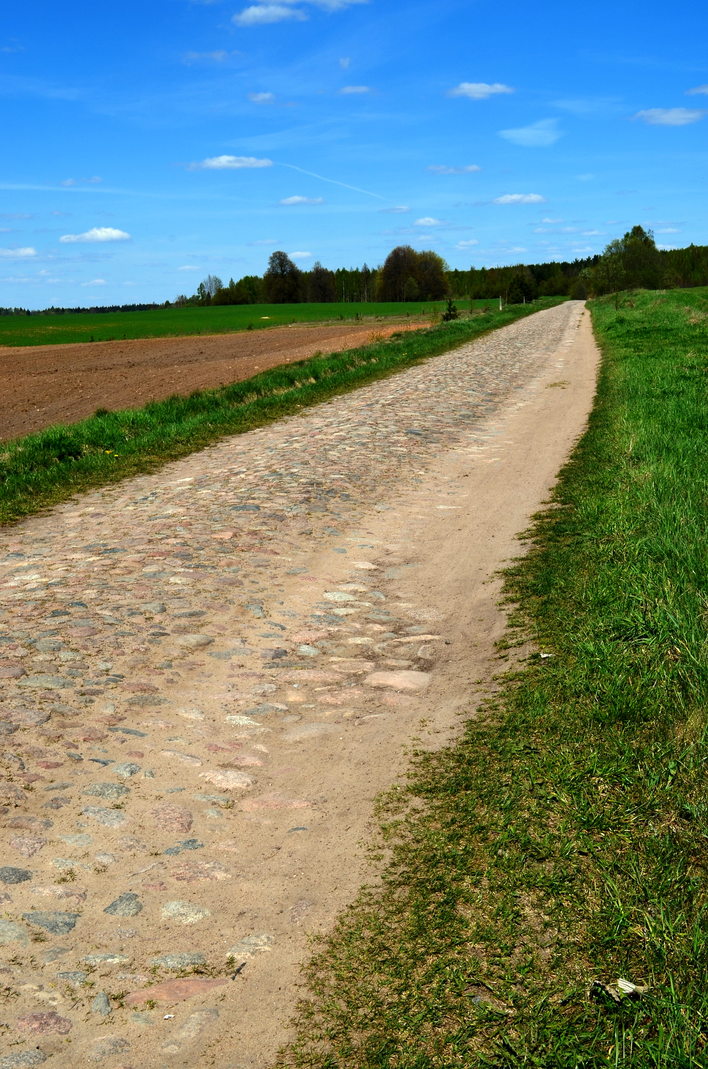 Akmenimis grįstas Liubavo dvaro kelias, Vilniaus raj.